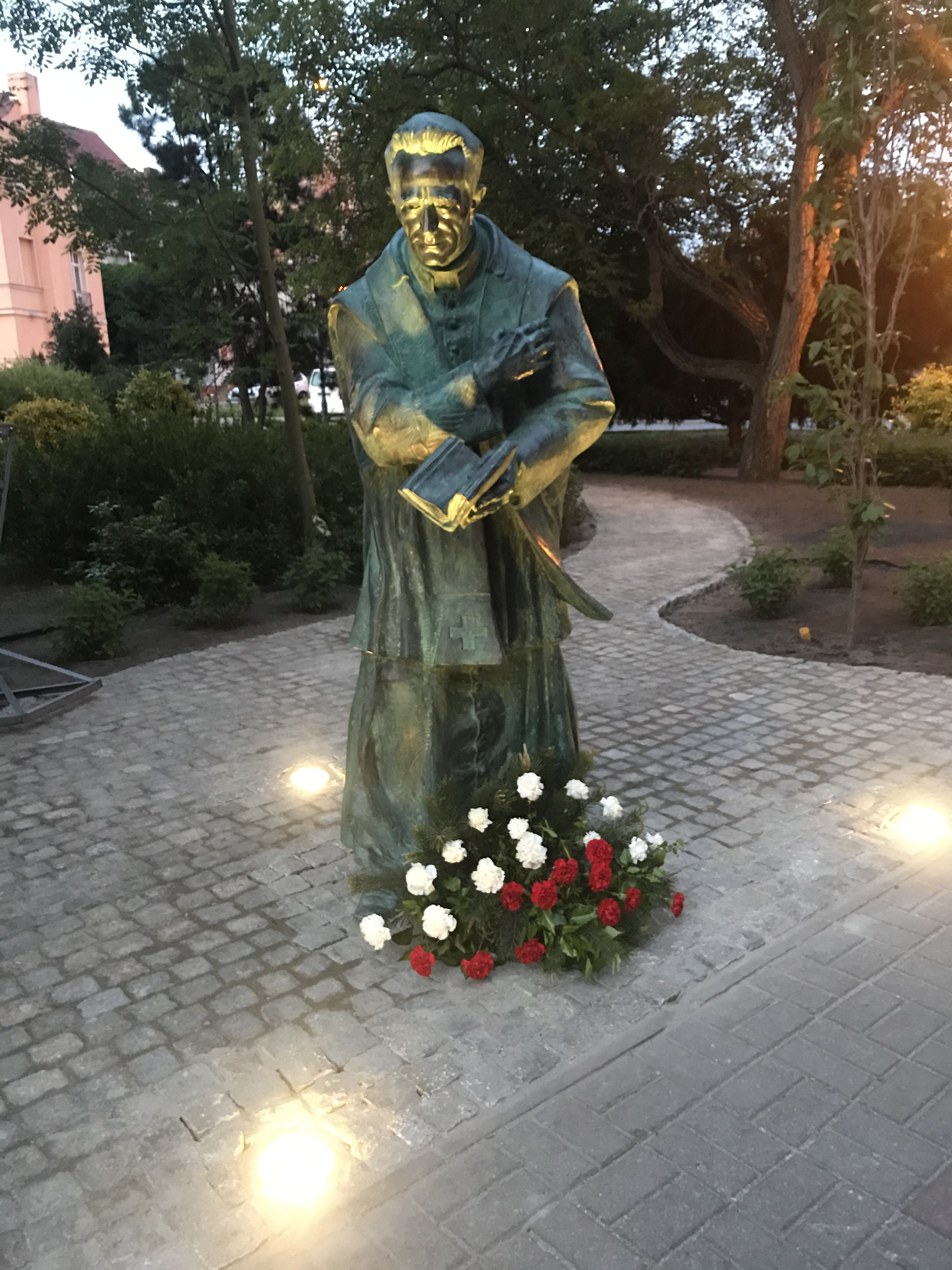 Zielona Góra - Pomnik ks. Kazimierza Michalskiego